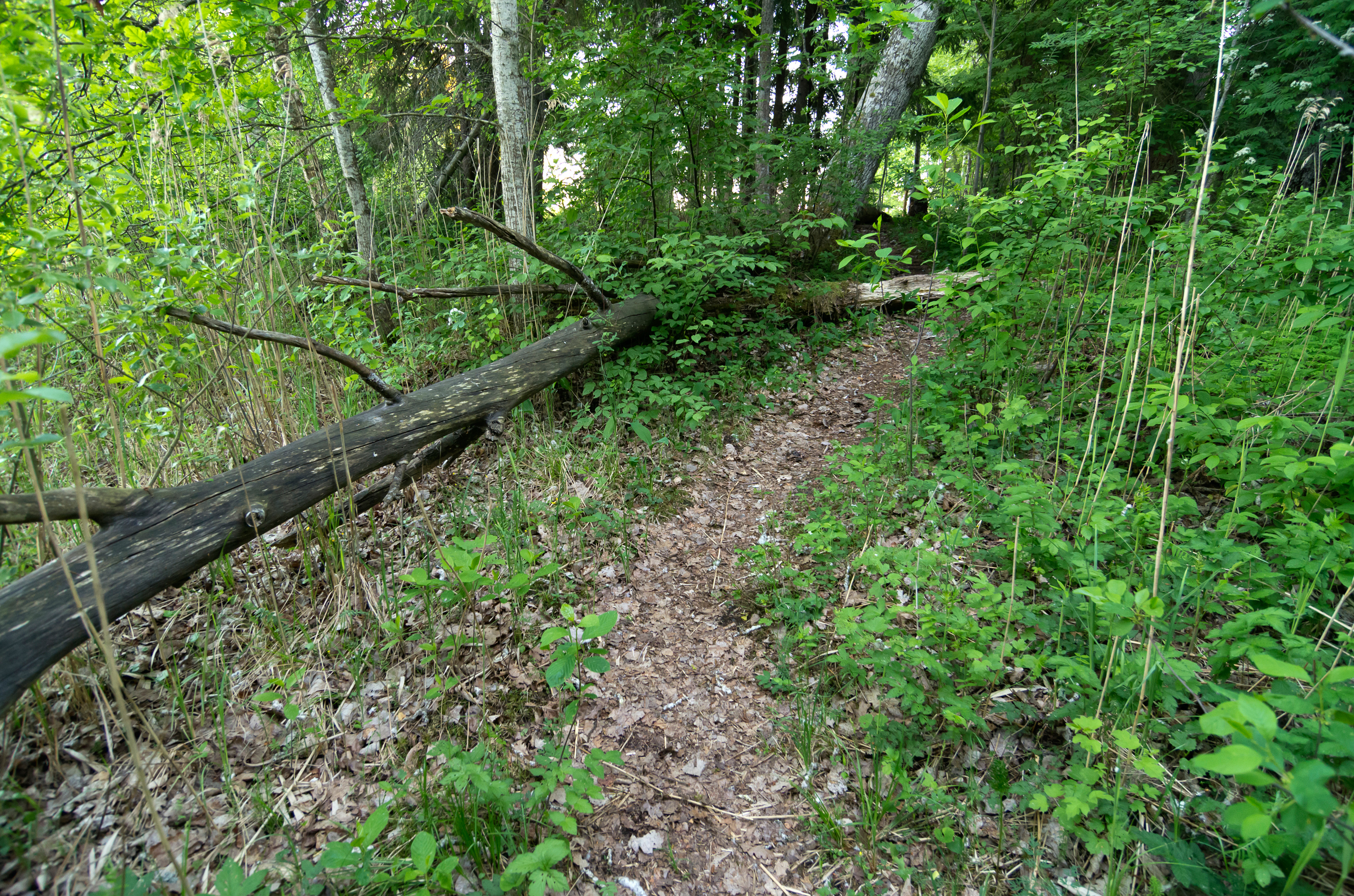 Pedassaar, Kaiu järve matkarada, Kääpa maastikukaitseala